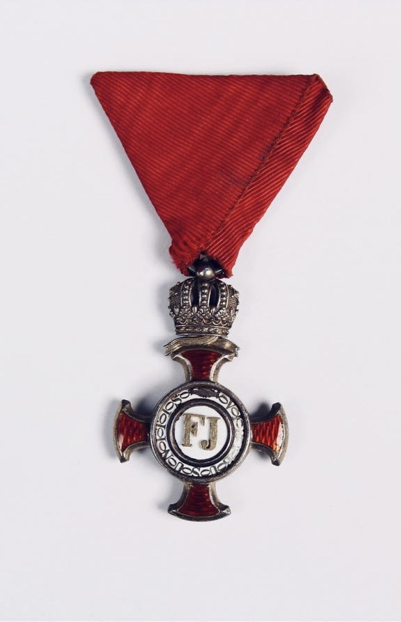 Arany Koronás Érdemkereszt